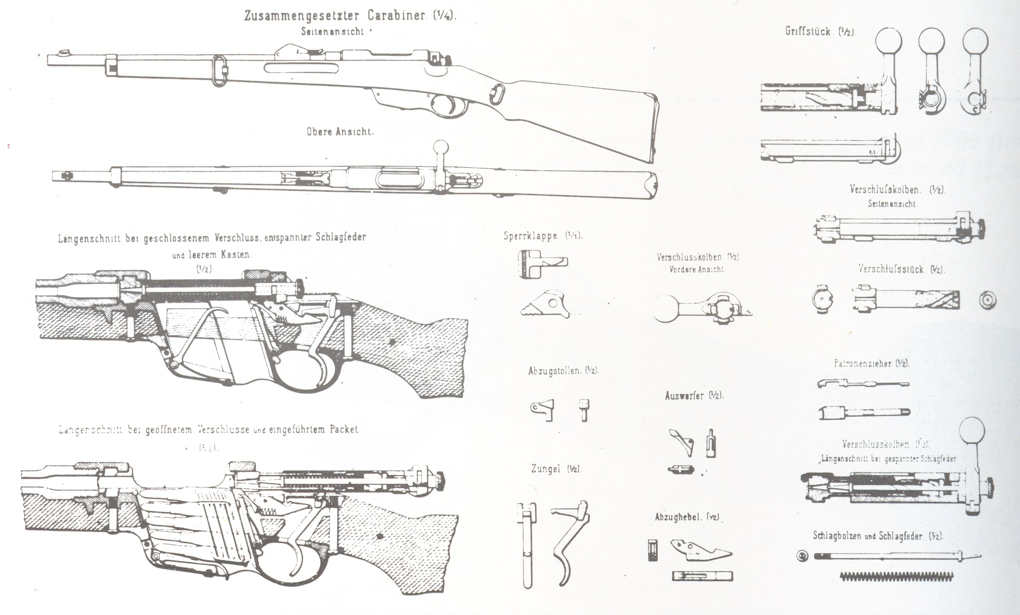 Skica puške Mannlicher M90.